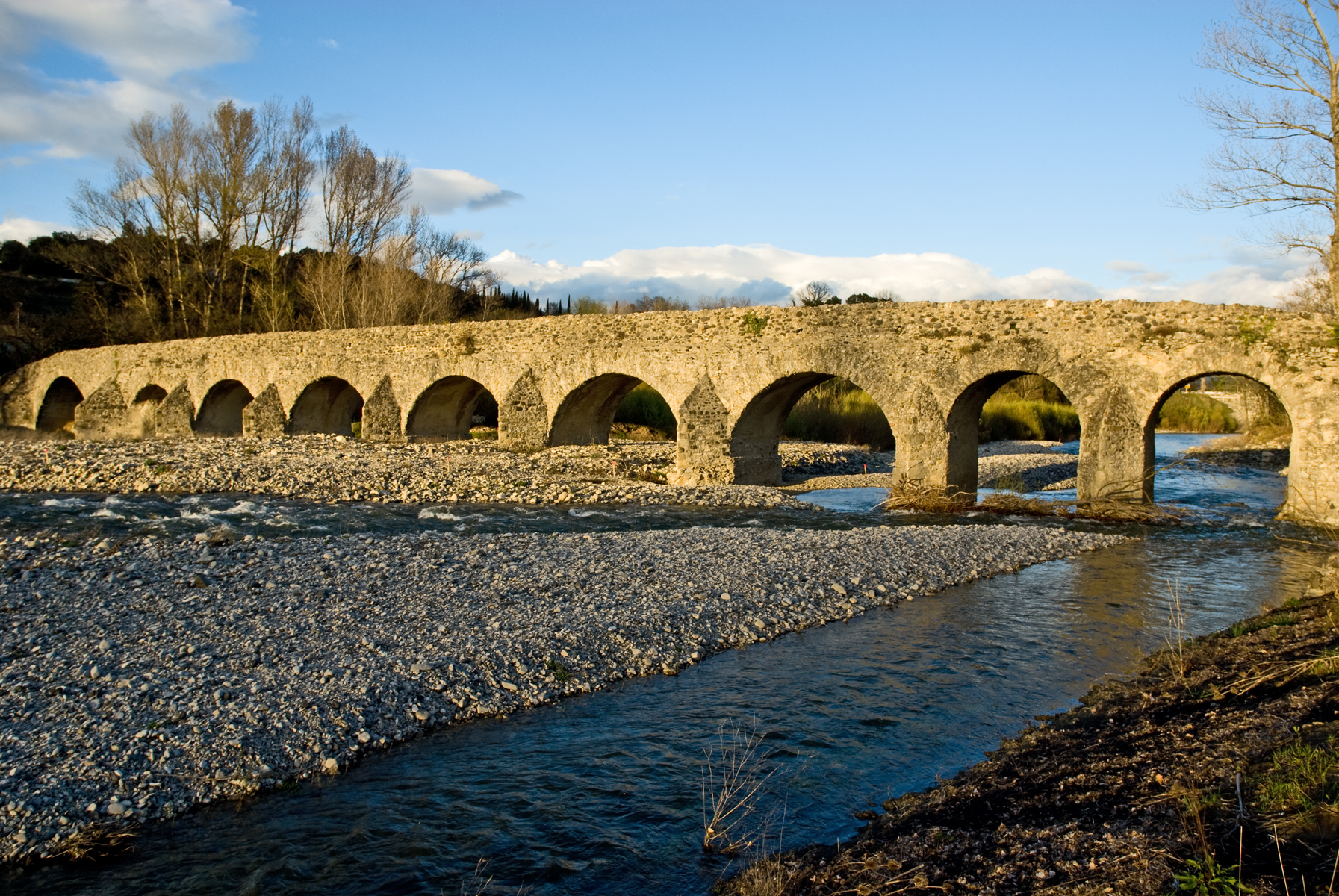 Pont romain, Le Pont (Classé, 1986) .